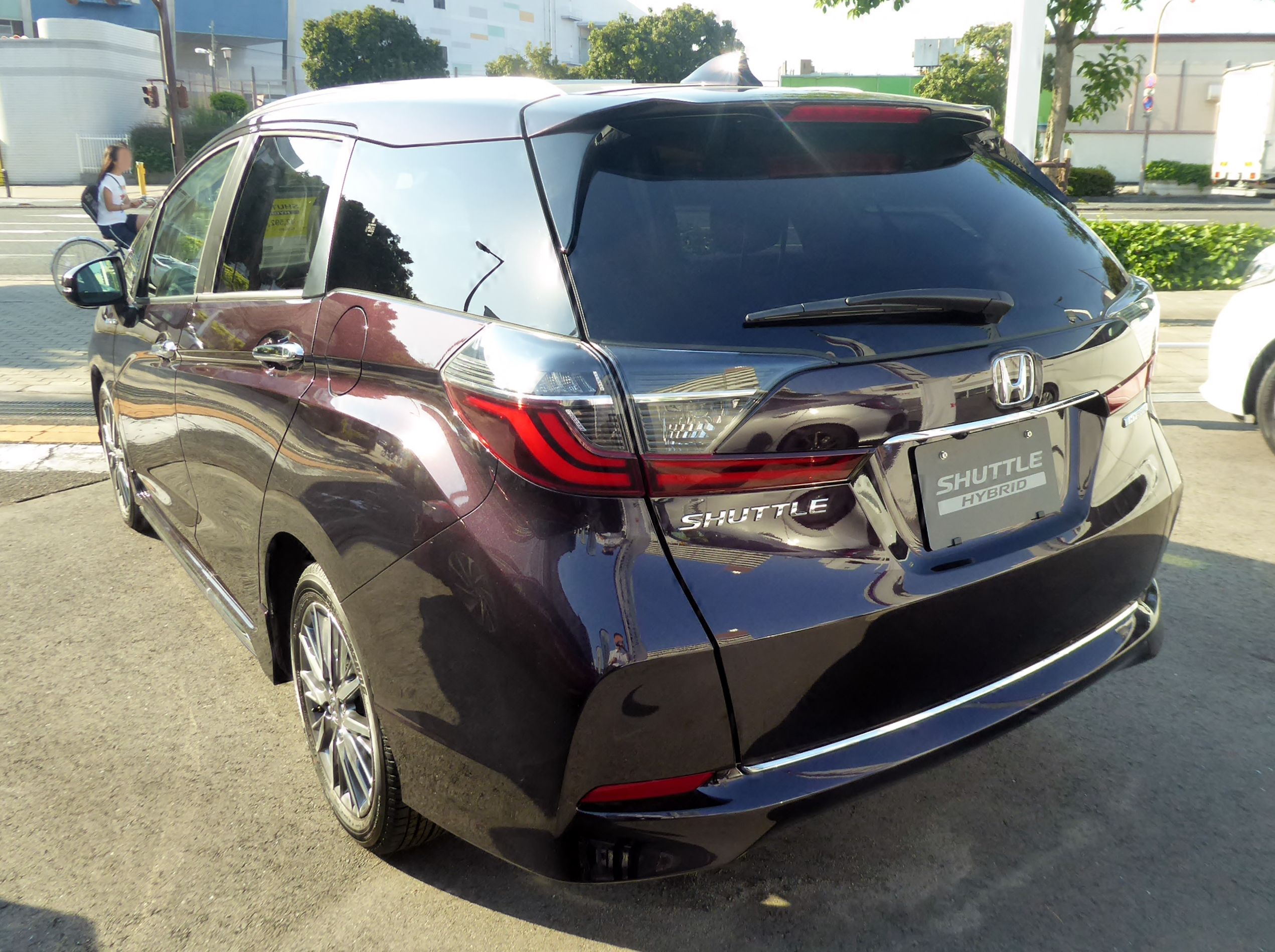 6AA-GP7型ホンダ・シャトルHYBRID Z・Honda SENSINGをリアから撮影。